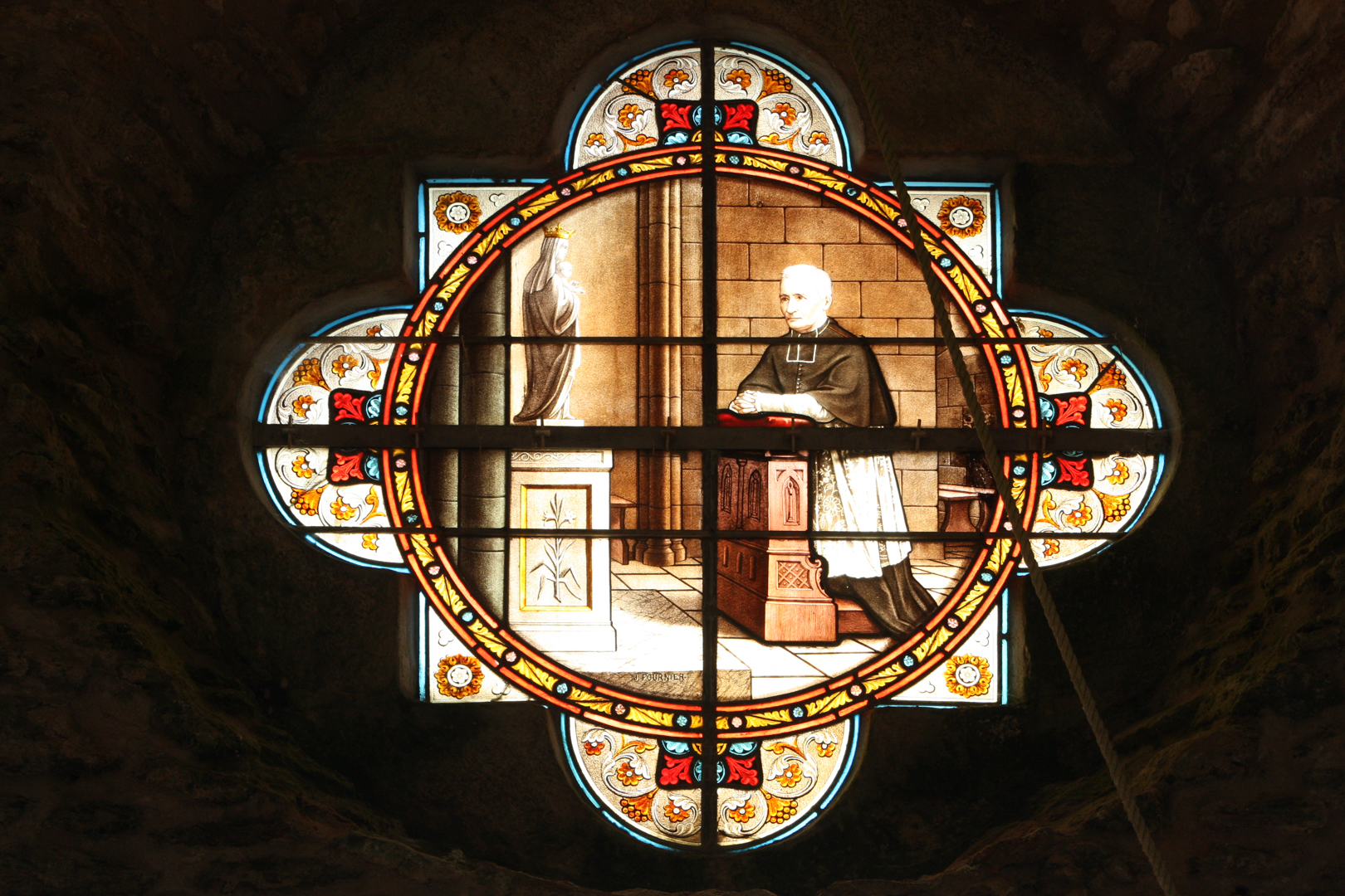 Vitrail situé au dessus de la porte d'entrée de la chapelle Notre-Dame-de-la-Côte à Penvins (Sarzeau - Bretagne).